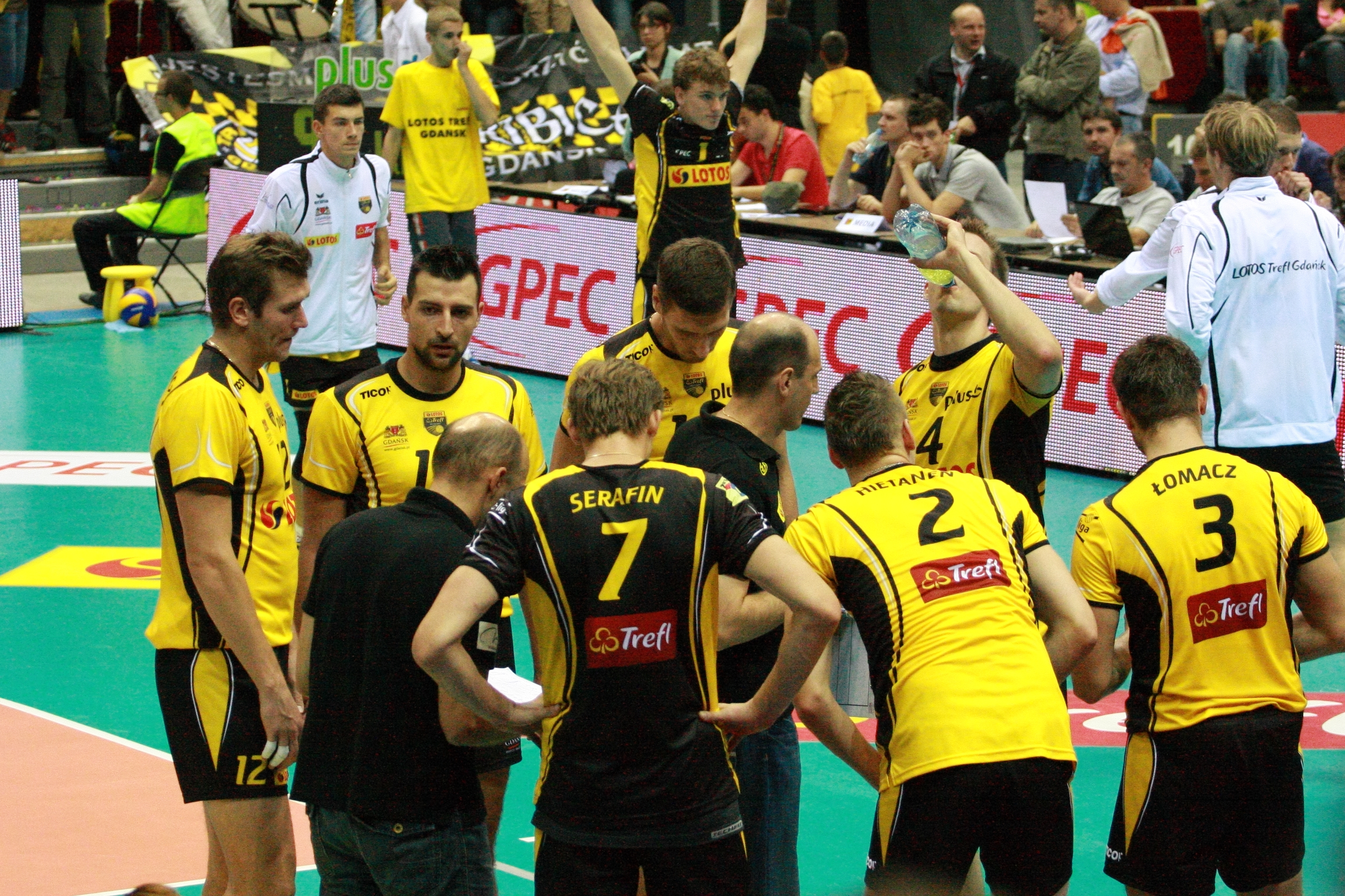 Lotos Gdańsk vs Skra Bełchatów.